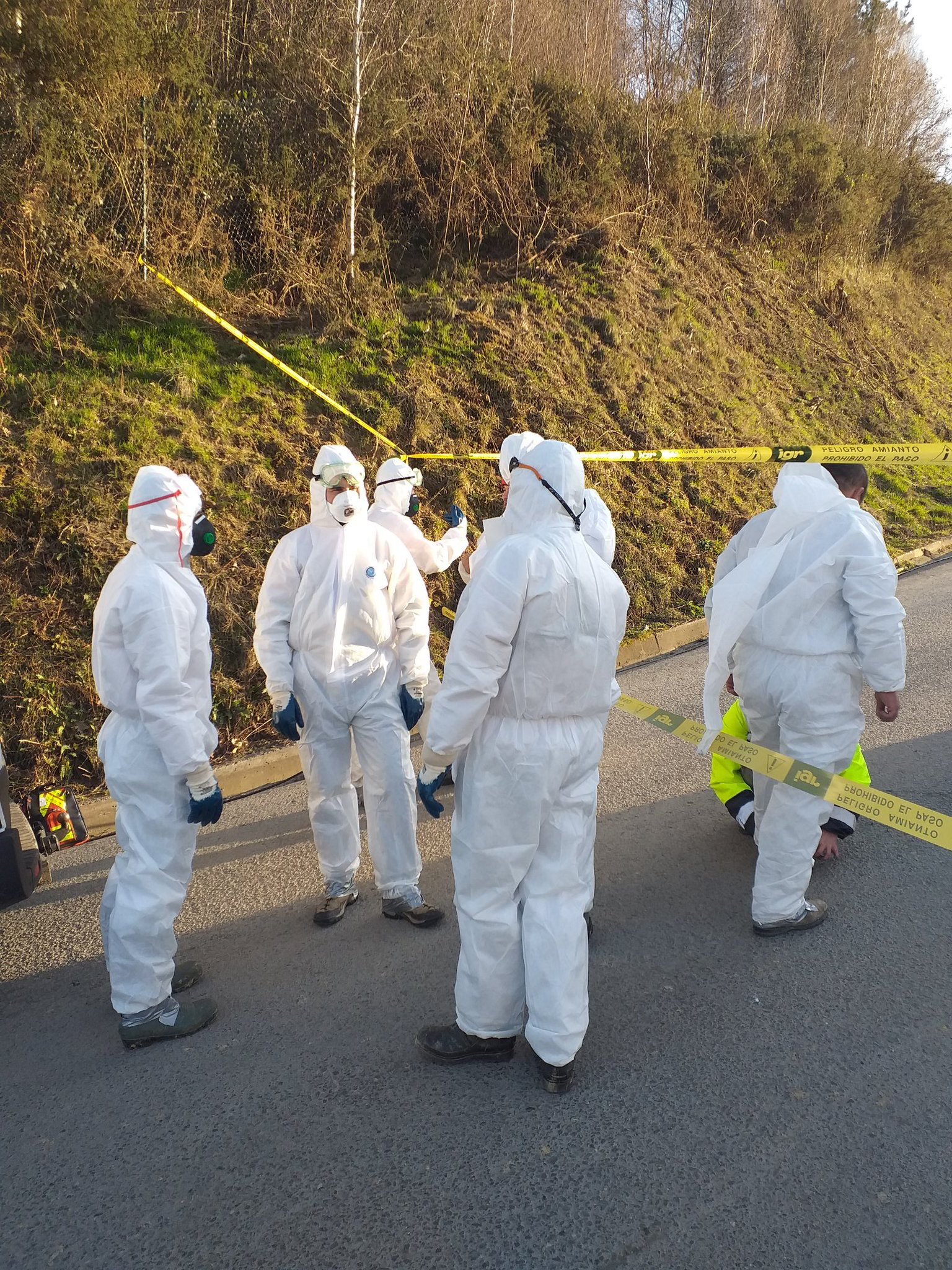 Zaldibarko zabortegiko erreskate taldea